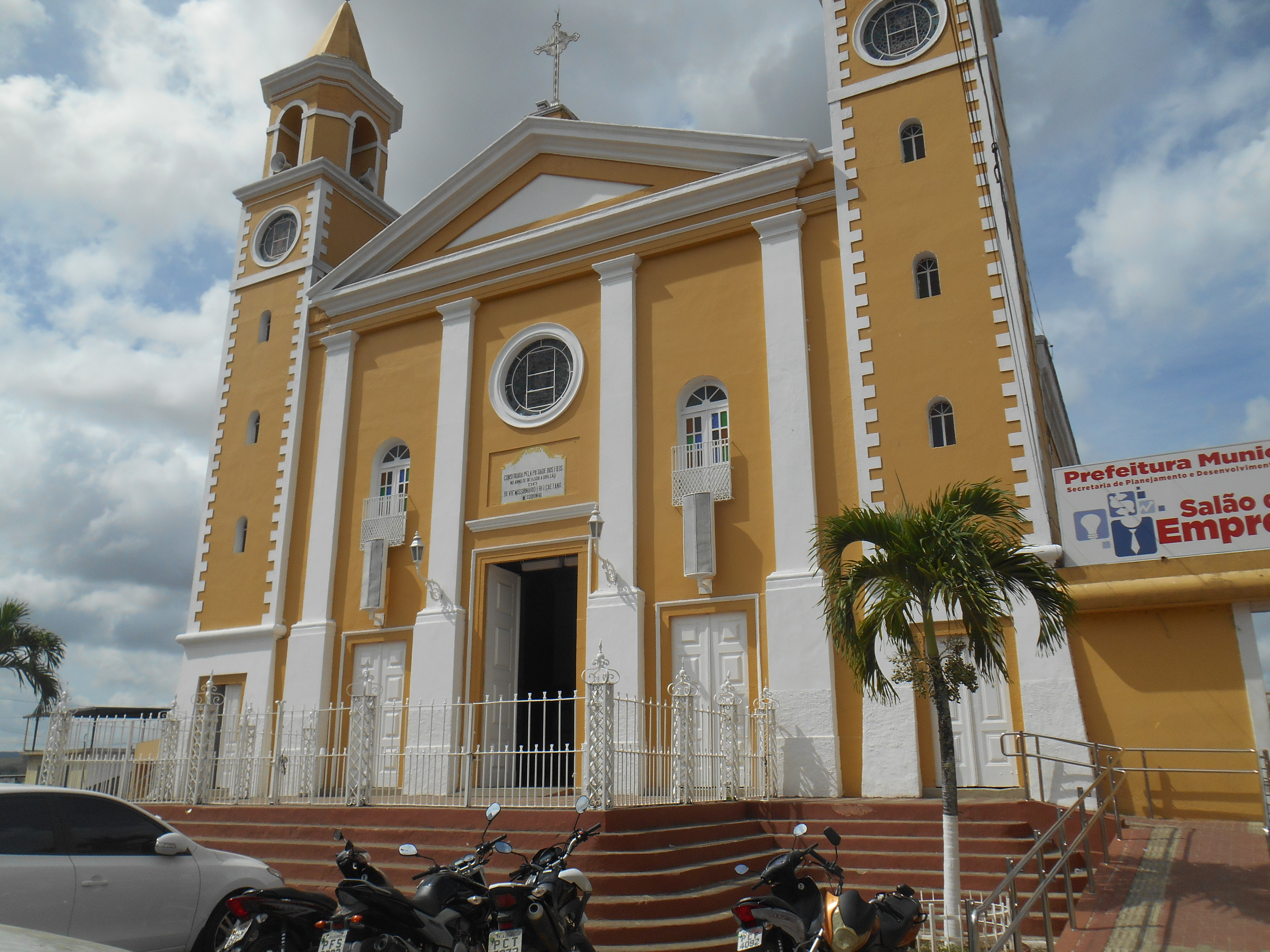 Igreja Matriz do município de Escada (Pernambuco)